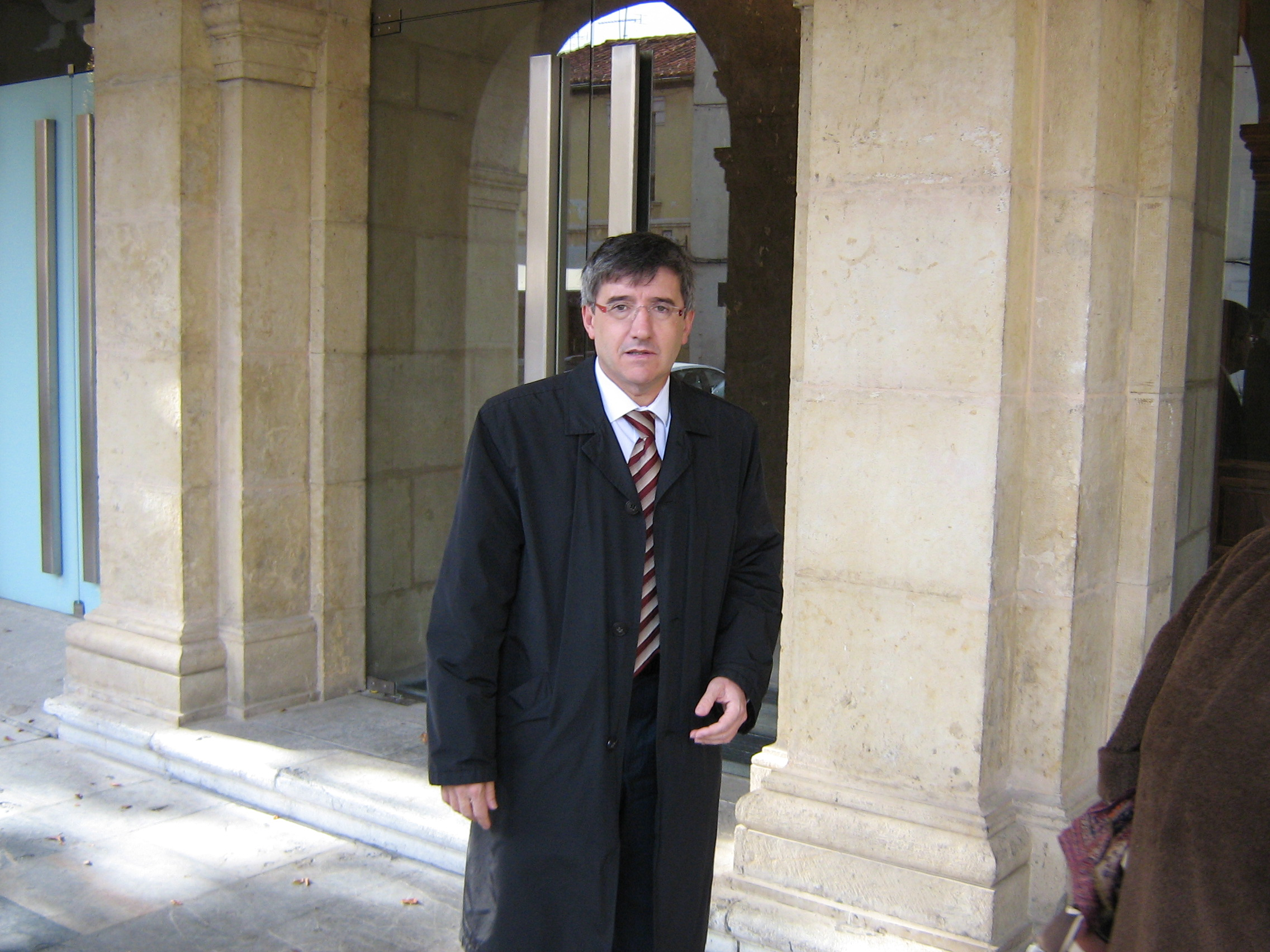 El alcalde de León, Francisco Fernández, se ha mostrado siempre opuesto al proyecto de REE.